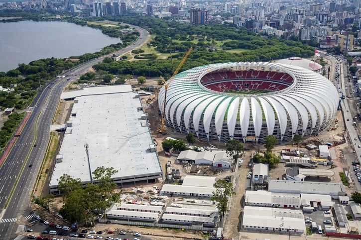 Estádio Beira-Rio, Porto Alegre, Brasil.